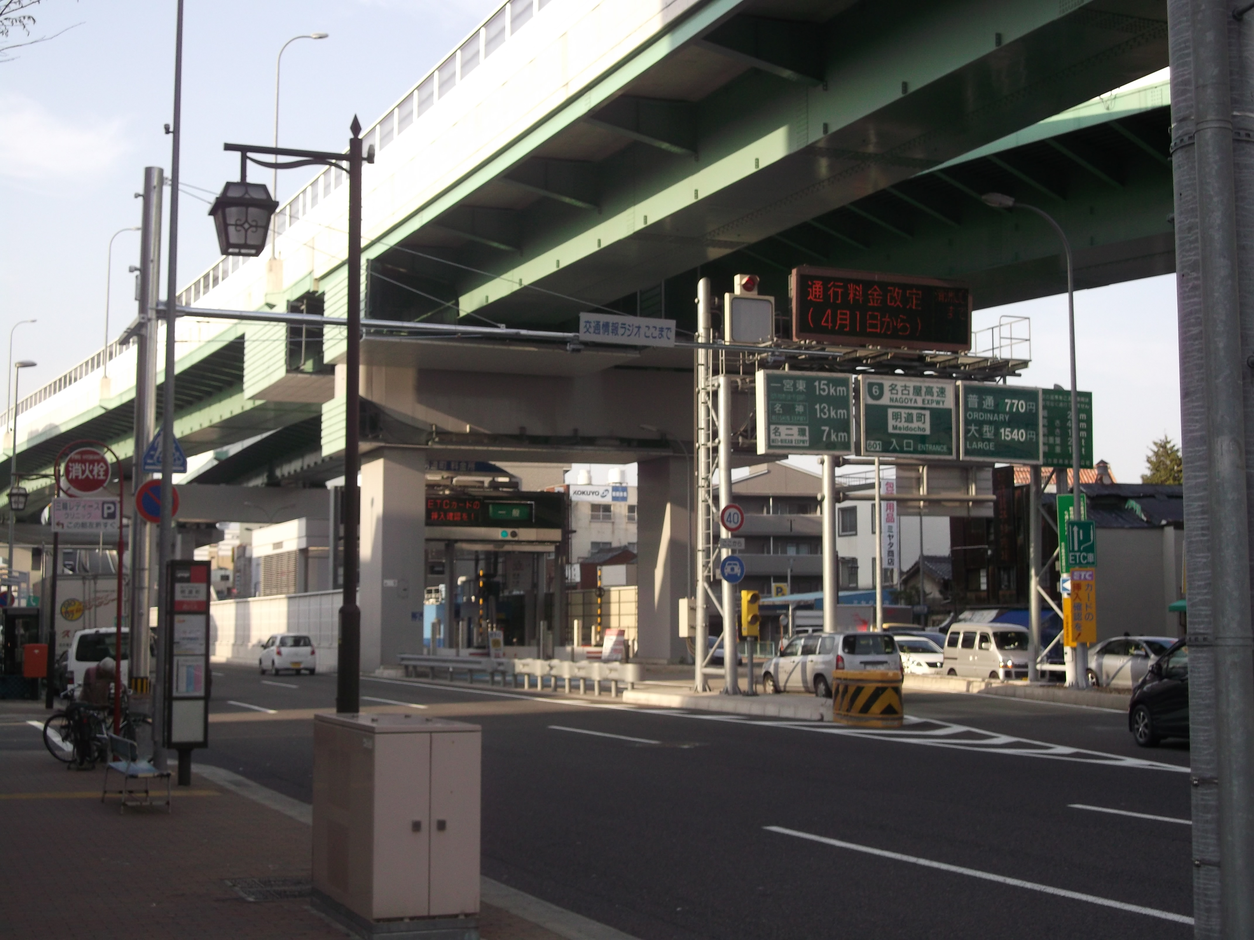 名古屋市西区幅下の名古屋高速6号清須線明道町入口を南東側より写す